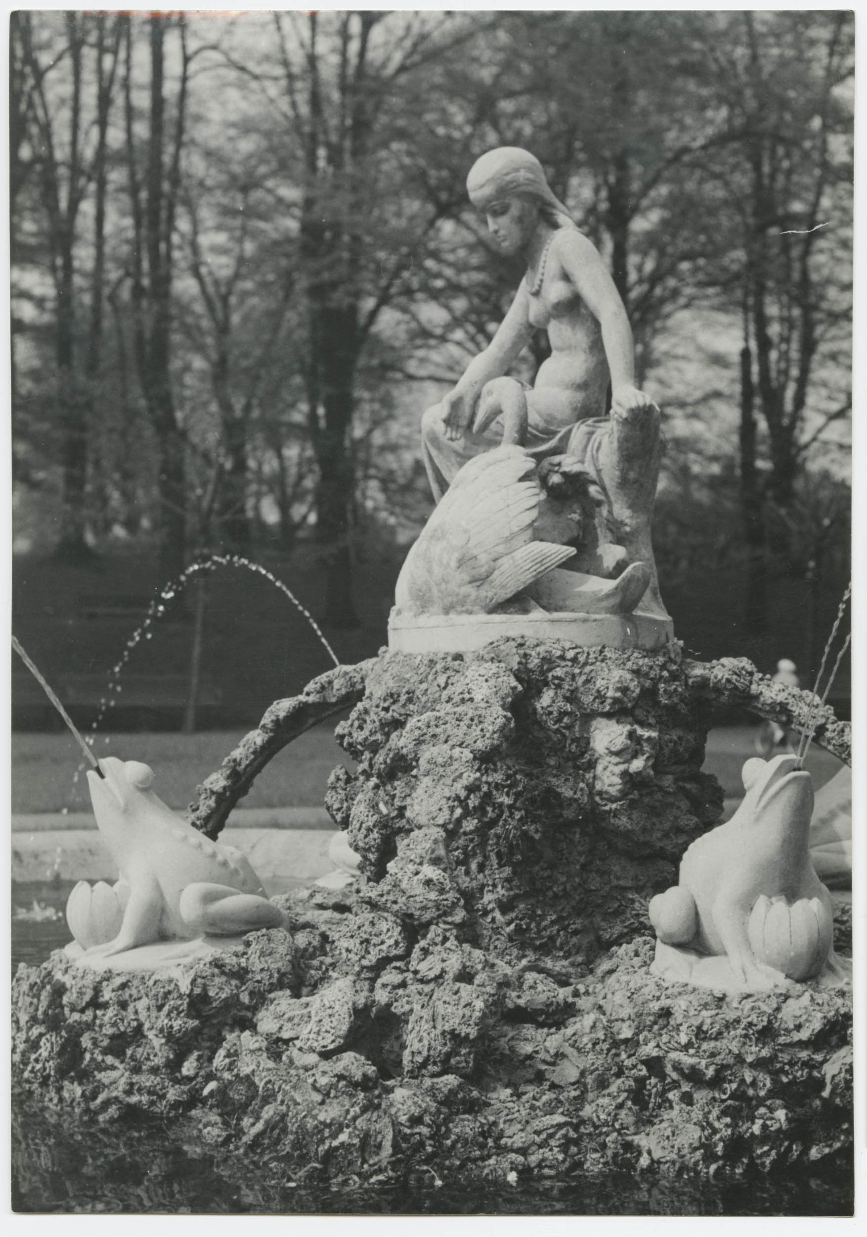 Fotografia przedstawia fontannę w parku Helenów. Park Helenowski został założony w latach 80. XIX wieku przez rodzinę Anstadtów, jako obiekt prywatny, do którego wstęp był płatny. Park stworzyła firma ogrodnicza L. Späth. Park był urządzony z przepychem, na zwiedzających czekały liczne atrakcje jak stawy z przystanią dla łódek, kamienną kaskadą na skarpie oraz wodotryskami, różane aleje, zwierzyniec (w którym oglądać można było m.in. niedźwiedzie i małpy), grotę z lawy wulkanicznej, tarasy, bogate kwietniki, muszlę koncertową, tor kolarski, korty tenisowe i boisko. W 1889 roku wybudowano drewnianą restaurację, a w następnym roku kolejną. Ponadto w parku znajdowały się: cukiernia, wieża widokowa, pawilon teatralny oraz hala sportowa. W trakcie I wojny światowej park został w dużej mierze zdewastowany i przez całe dwudziestolecie międzywojenne nie powrócił już do dawnej świetności. Po II wojnie światowej był przez rok użytkowany przez wojsko, potem przeszedł na własność miasta. Nazywał się wtedy parkiem 19 Stycznia. Park został uporządkowany i udostępniony mieszkańcom Łodzi. Wschodnią część przekazano klubowi sportowemu. W latach 50. XX wieku organizowano w nim koncerty, zabawy, wystawy. W latach 60. XX wieku zlikwidowano ogrodzenie. W trakcie odnawiania parku w latach 70. XX wieku rozebrano muszlę koncertową, zwierzyniec, przystań, wzmocniono drogi i skarpy, wyremontowano sztuczną grotę, fontanny i mostek. Przez wiele lat park był zaniedbany, dopiero w latach 90. XX wieku przeprowadzono renowację: odtworzono stawy oraz alejki, zbudowano obszerny plac zabaw dla dzieci oraz oświetlono główne aleje. Brama wjazdowa została odnowiona, a w miejscu widocznej na zdjęciu fontanny , mocno już zrujnowanej utworzono kwietnik.